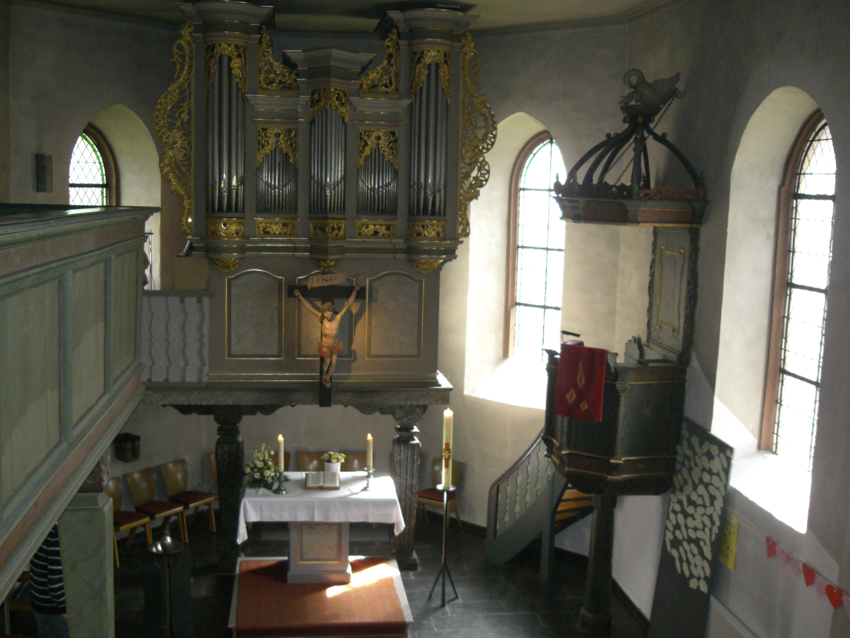 St. Georgskirche Steinbach Taunus 61449 Innenraum mit Altar und Kanzel